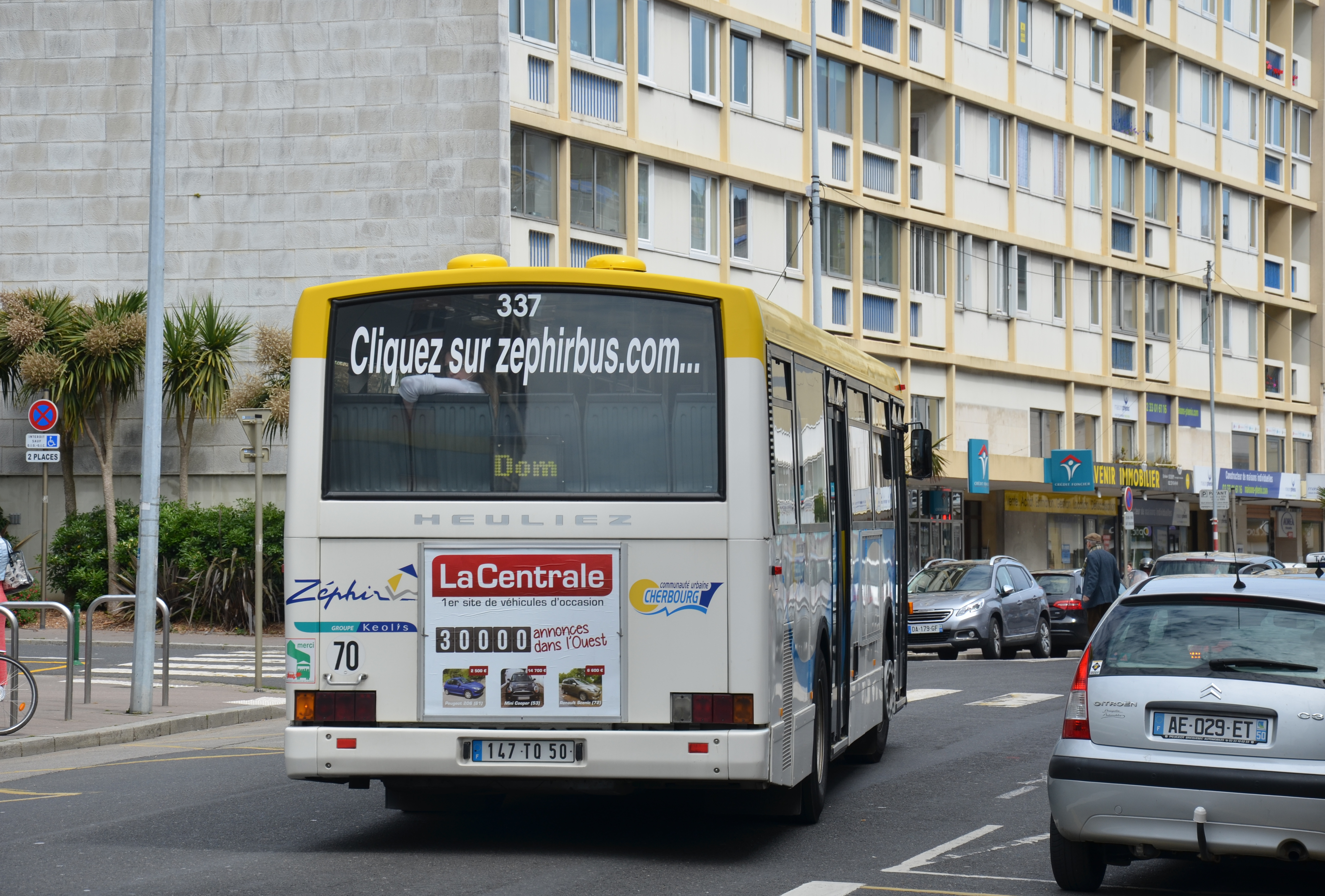 Heuliez GX 107 n°337 assurant un service scolaire "Domino" et quittant l'arrêt Schuman, sur le réseau Zéphir Bus de Cherbourg.